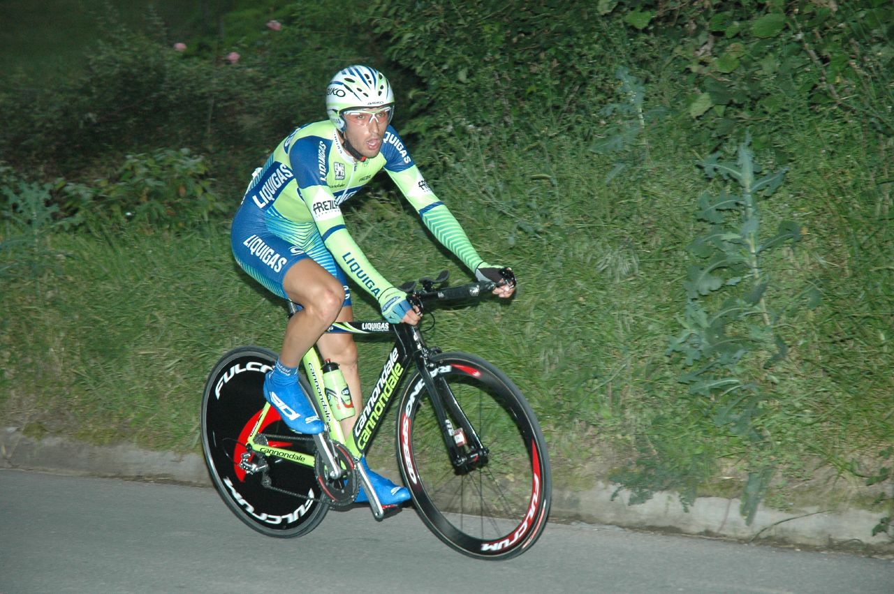 Dario Cataldo, Euskal Bizikleta 2007